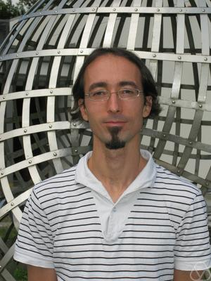 Foto di Nikolay Nikolov